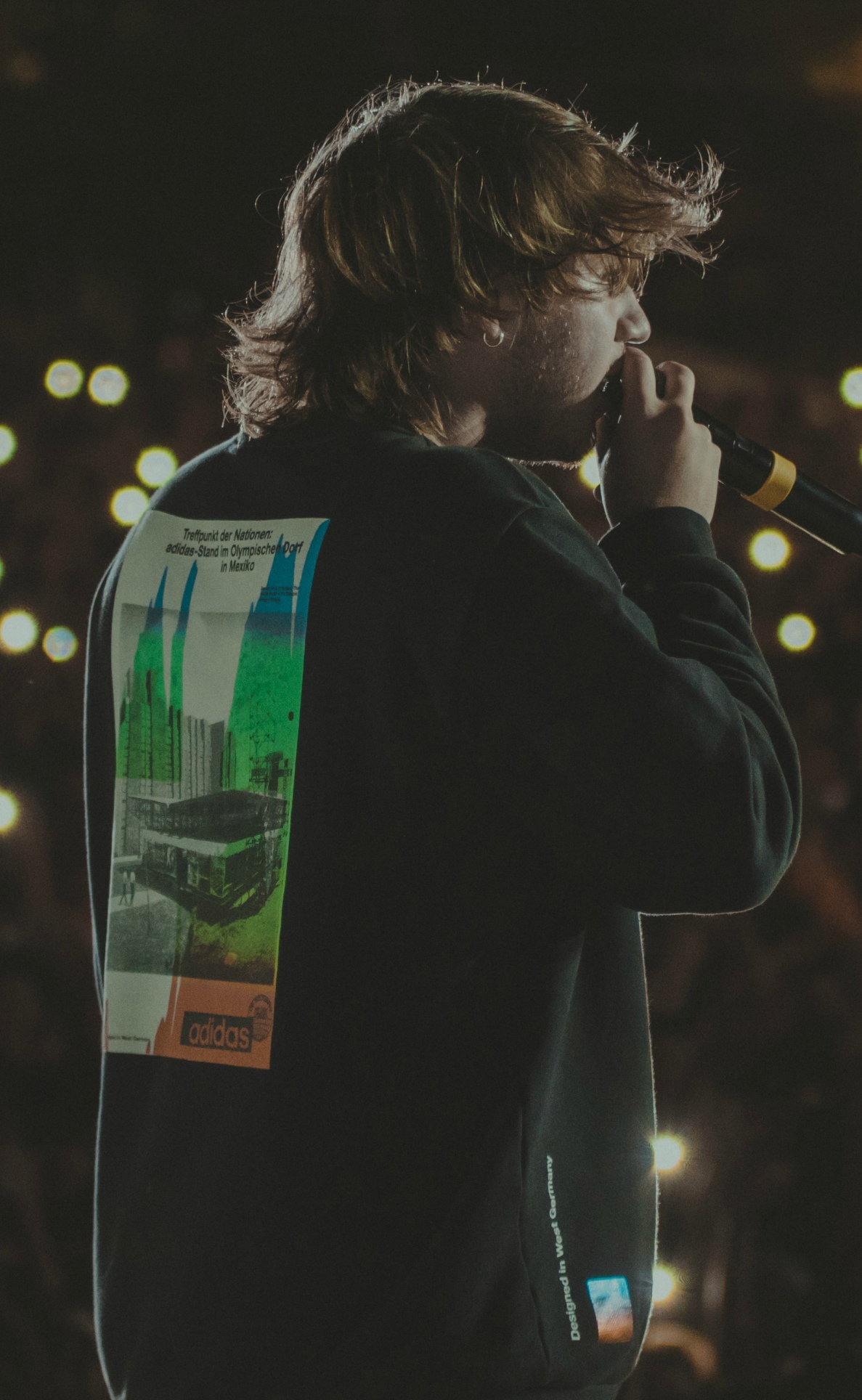 El cantante Paulo Londra en un concierto en Mendoza Argentina